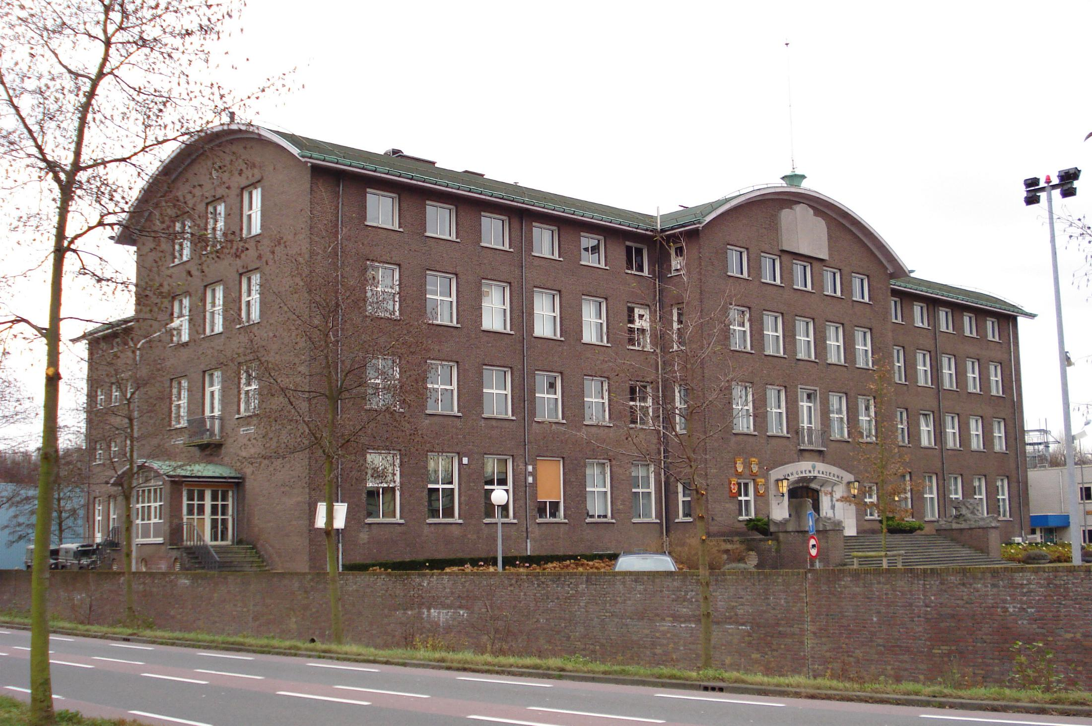 Rotterdam, De Esch. Marinierskazerne: van Ghentkazerne.